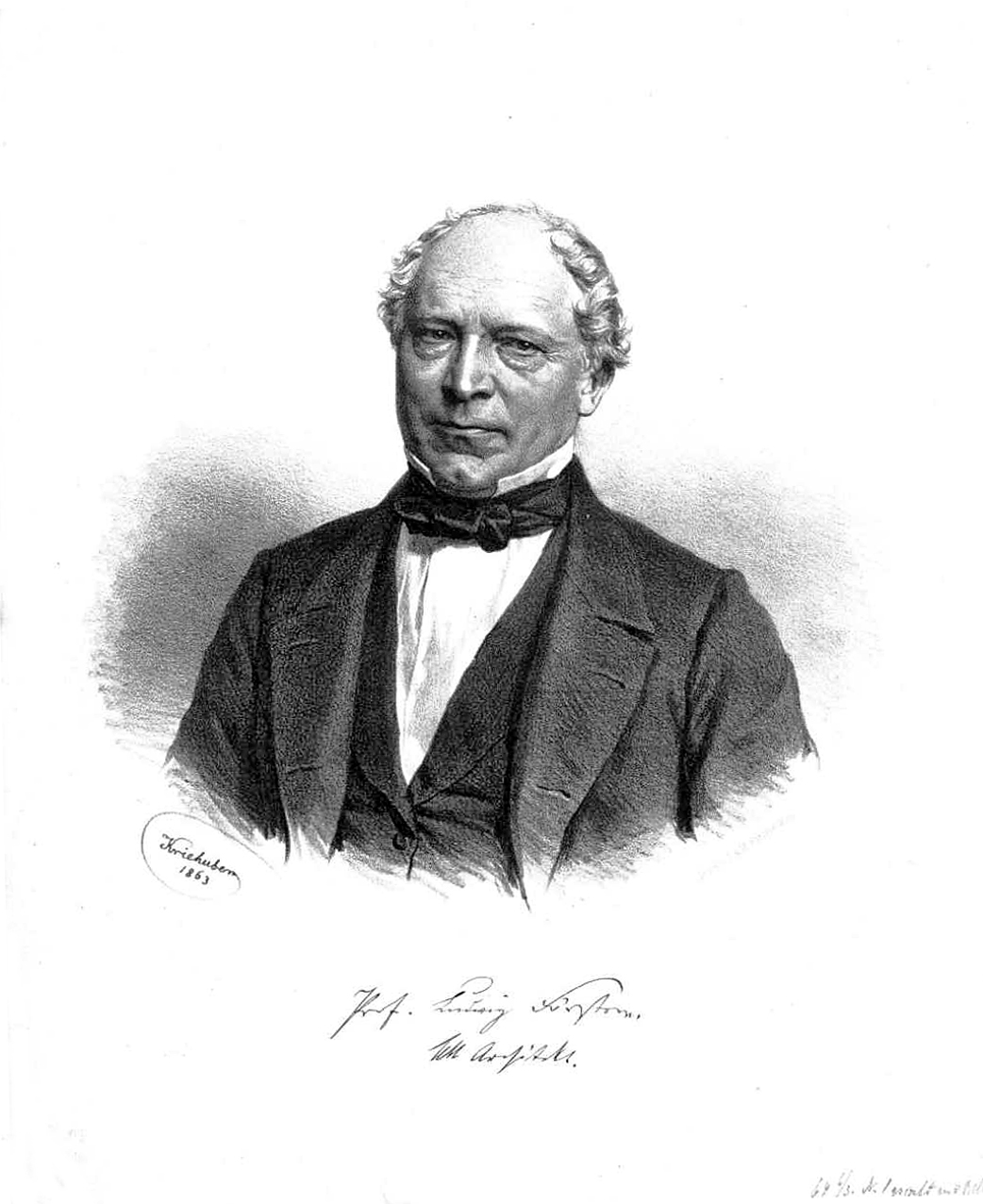 Ludwig Ritter von Förster